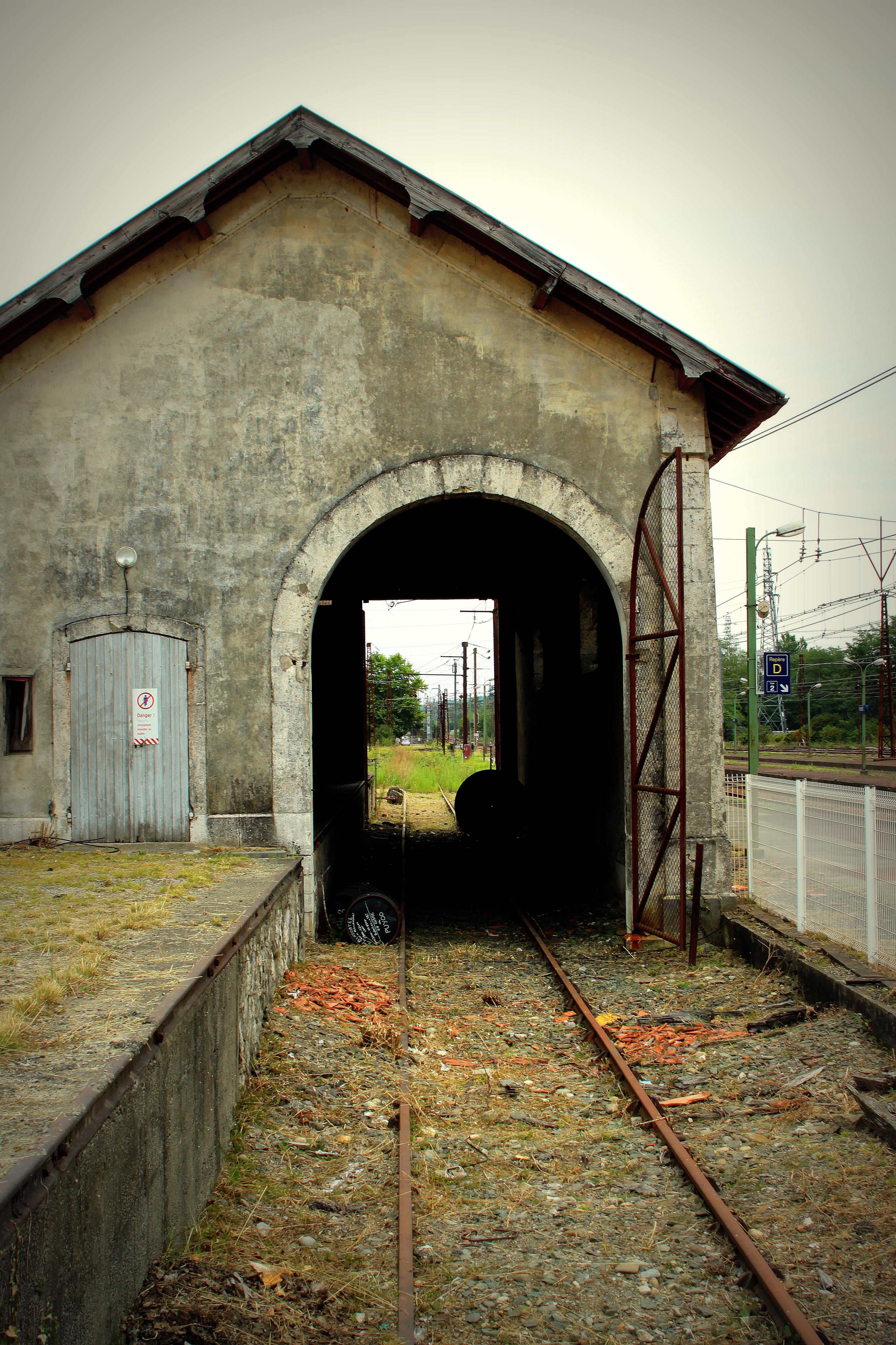 E gedeckte Quai an der Gare vu Puyoô